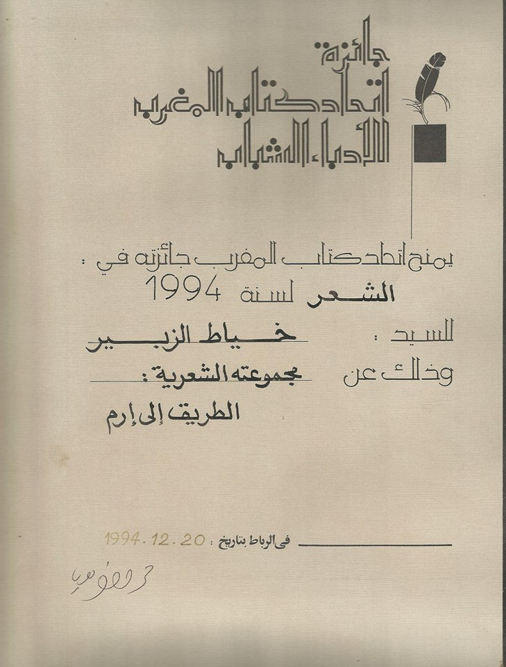 جائزة الشعراء الشباب للشعر، 1994